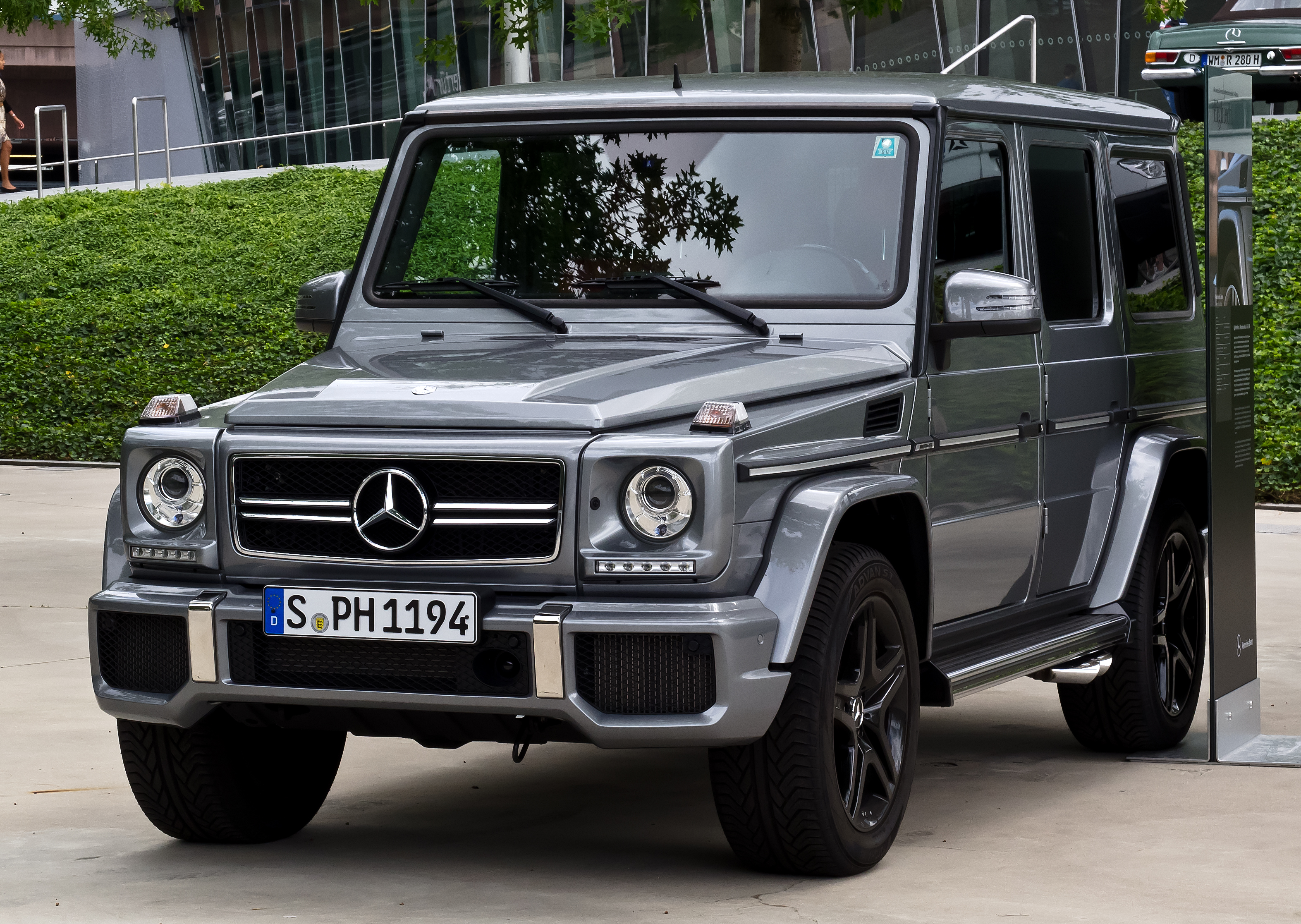 Mercedes-Benz G 63 AMG (W 463, 3. Facelift)